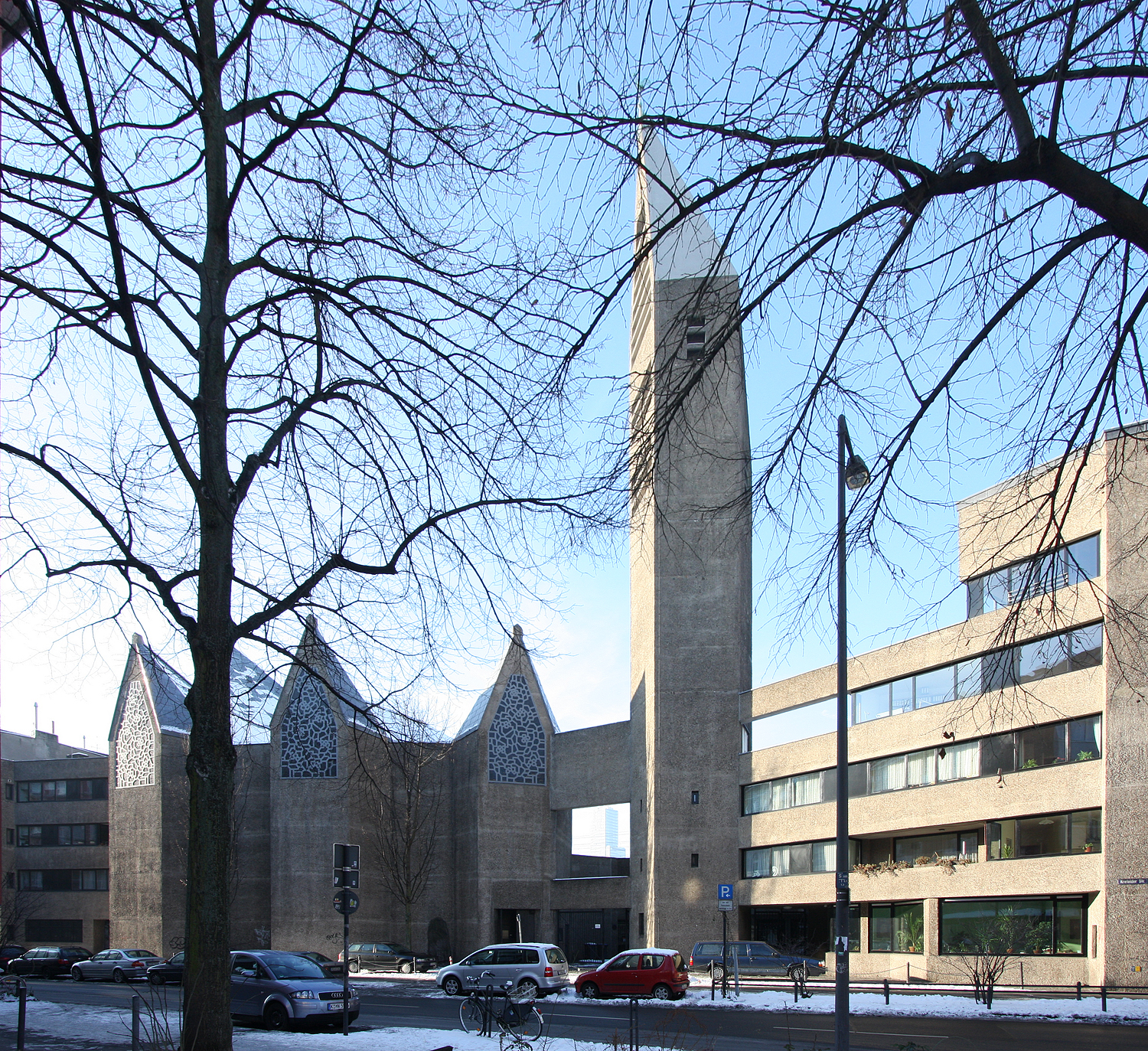 Katholische Kirche St. Gertrud in Köln, Ostseite mit Turm